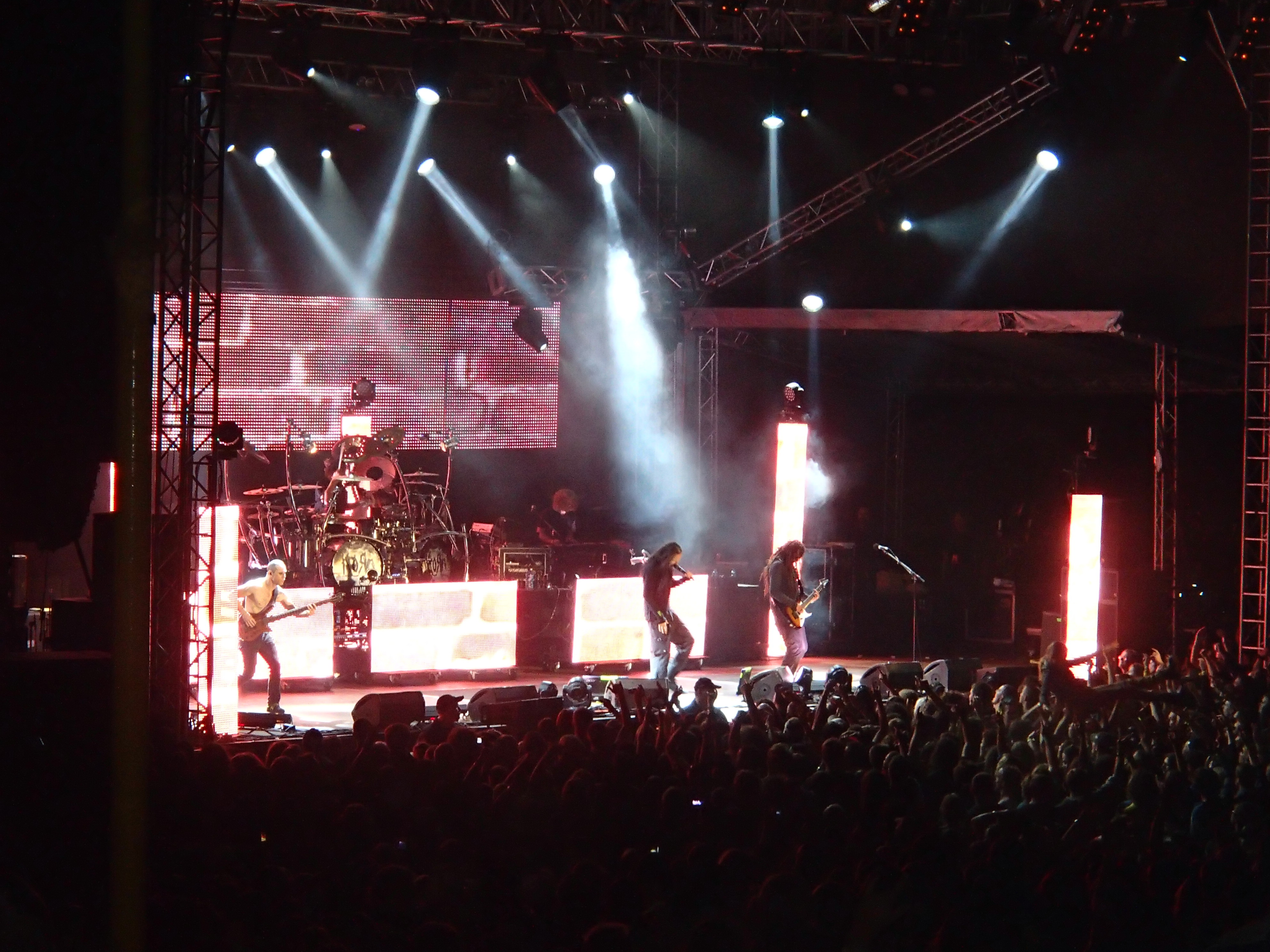 Trutnov Open Air Music Festival 2012 - Korn